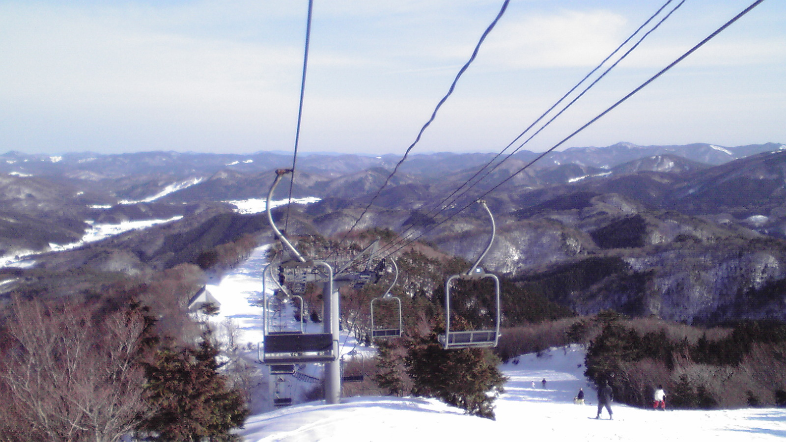 大佐スキー場の里見尾根コースのリフトから撮影したもの。